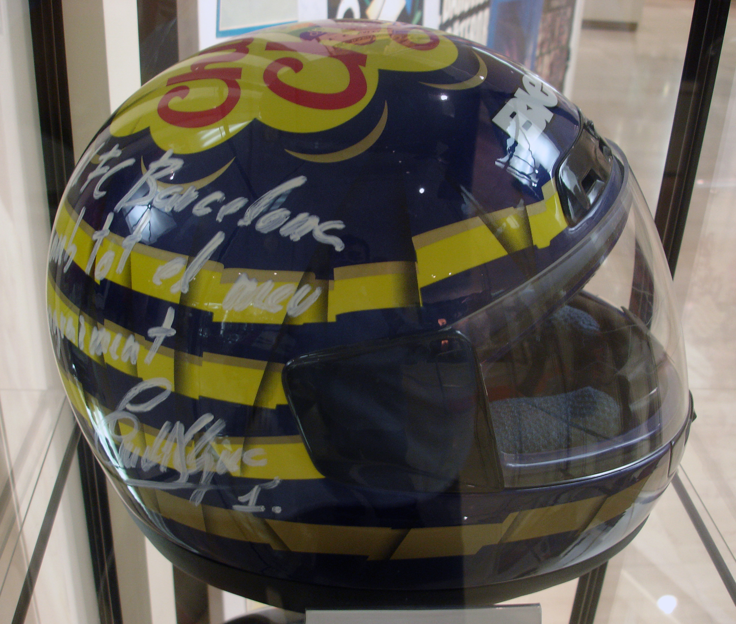 Casco que llevaba Emilio Alzamora cuando ganó el Campeonato del Mundo de 125cc (1999). Cedido por el piloto al Museo del FC Barcelona.